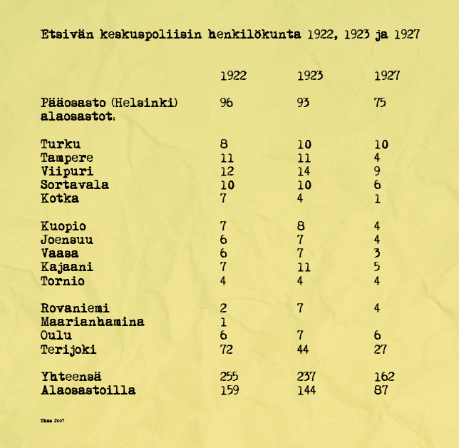 Etsivän keskuspoliisin henkilökunta 1922-27. Number of personnel in Finland's first secret police between 1922-1927.